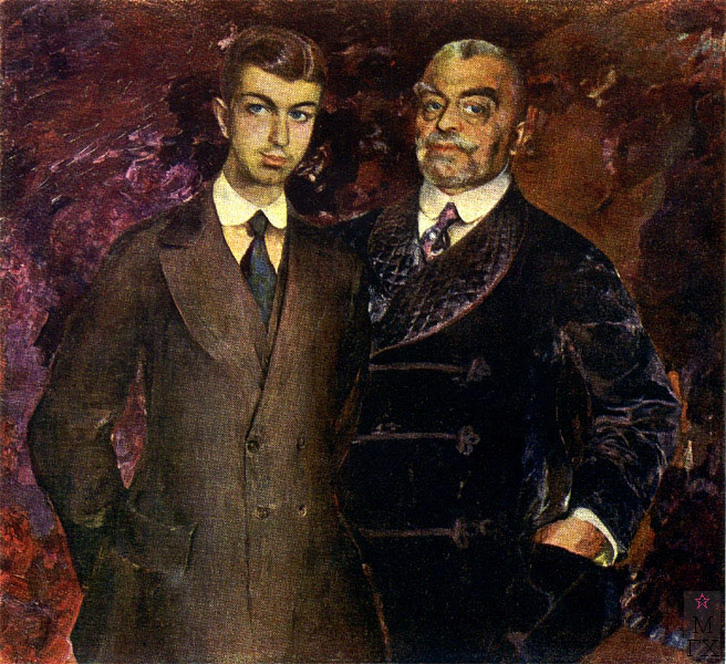 Портрет Павла Ивановича Харитоненко с сыном. 1911. Темпера, масло. 114.5х130. Харьковский муз. изобр.искусств